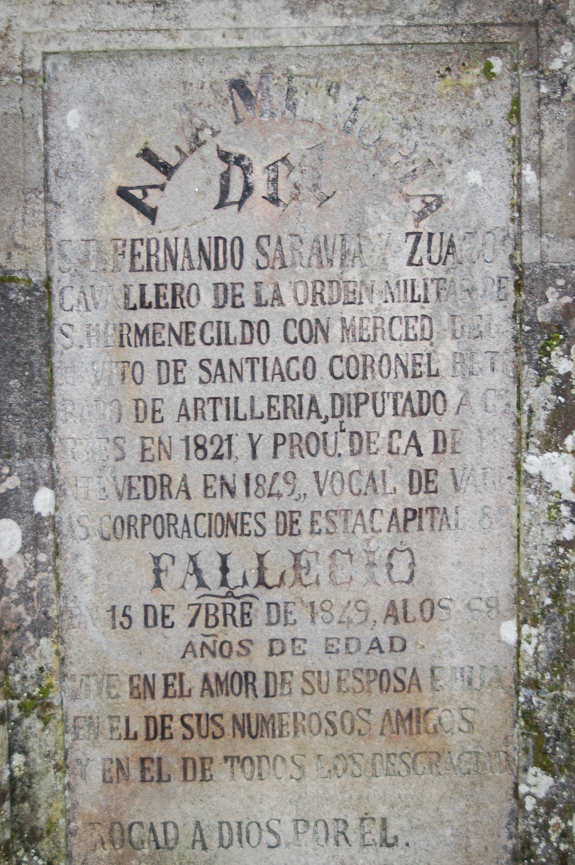 Sepulcro de Fernando Sarabia no Cemiterio de San Amaro de Pontevedra